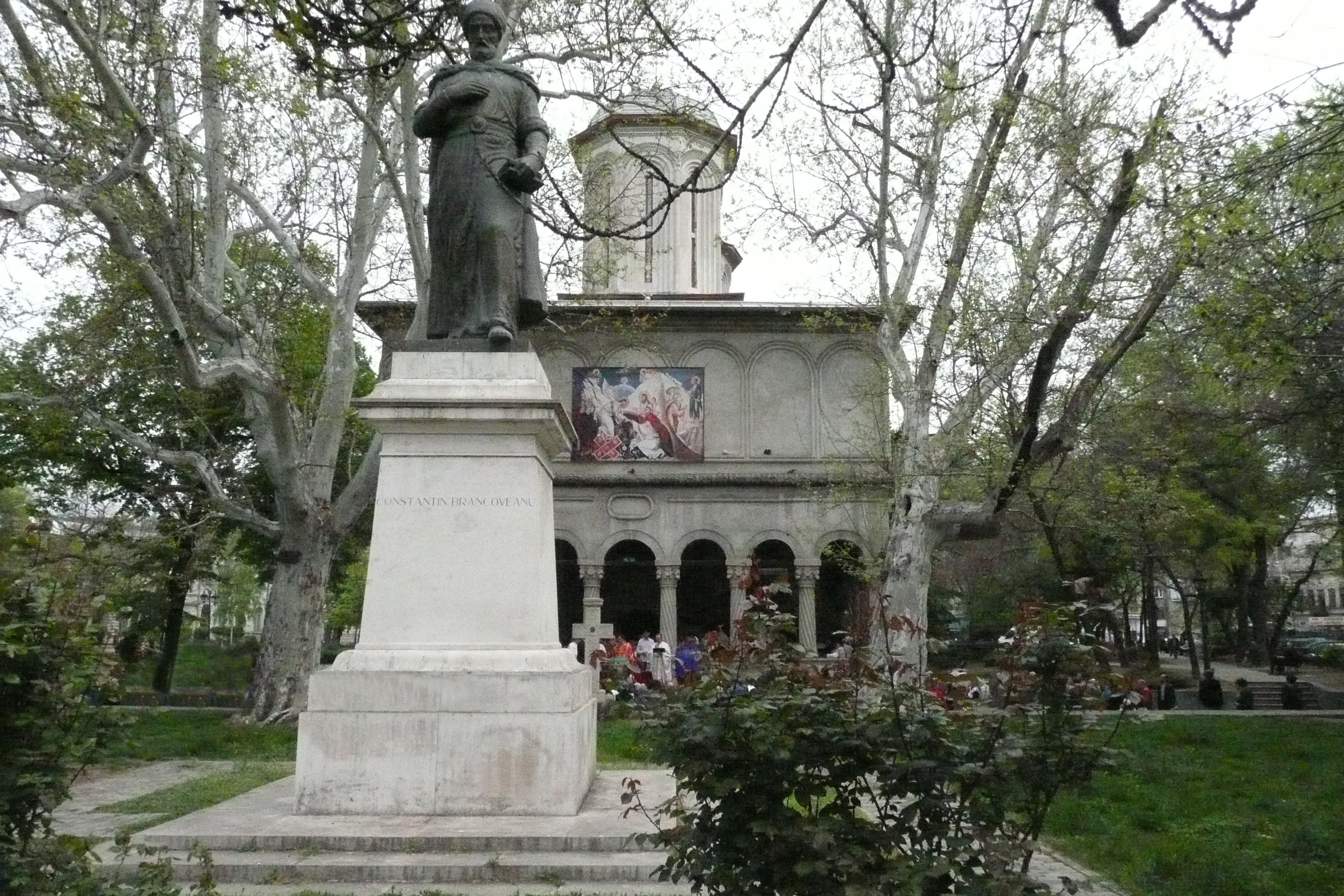 Το άγαλμα του Κωνσταντίνου Μπρινκοβεάνου, εμπρός από την εκκλησία του Αγίου Γεωργίου στο Βουκουρέστι, όπου μεταφέρθηκαν τα οστά του.